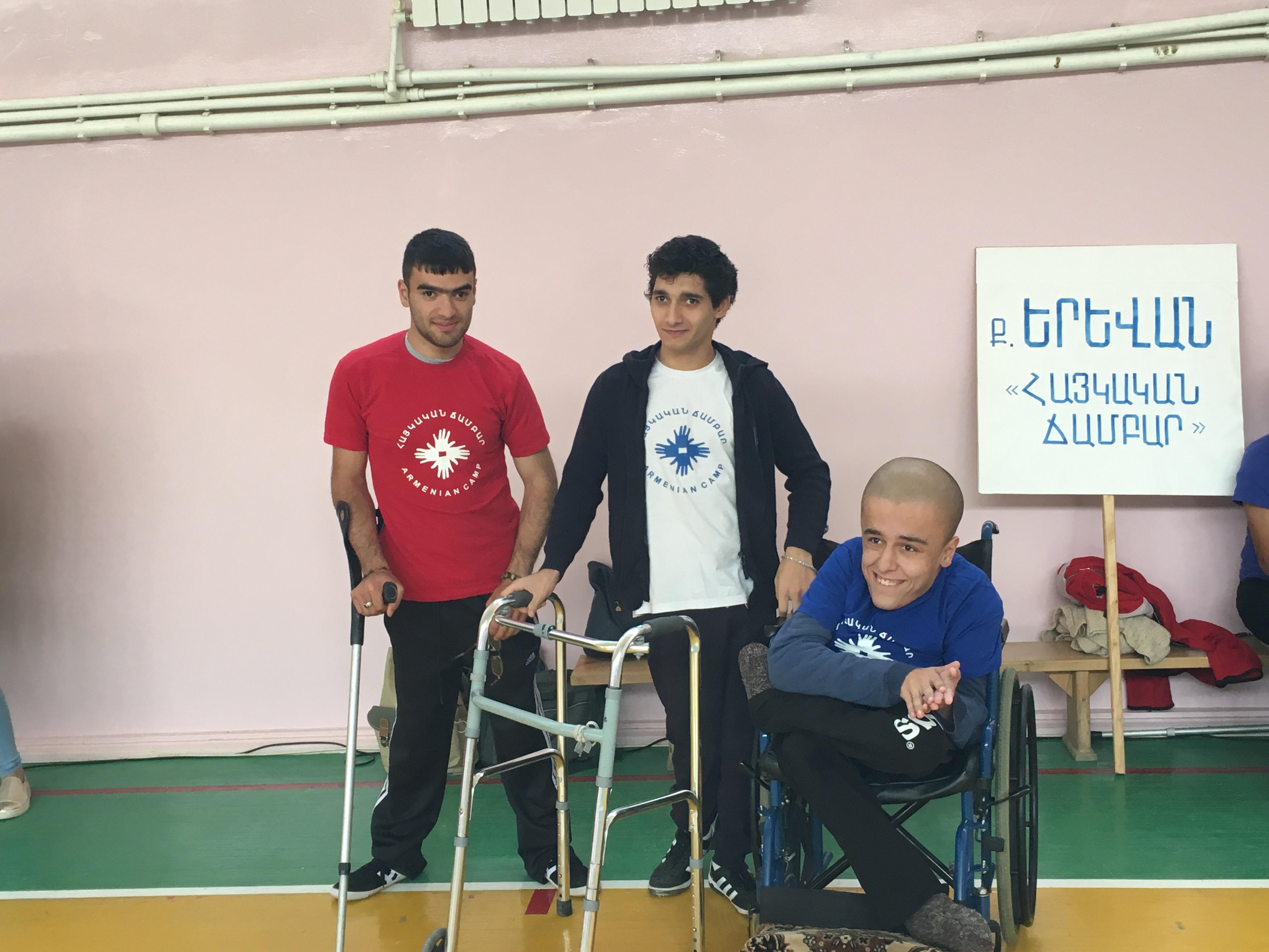 Բոչիայի բաց առաջնություն Արցախում